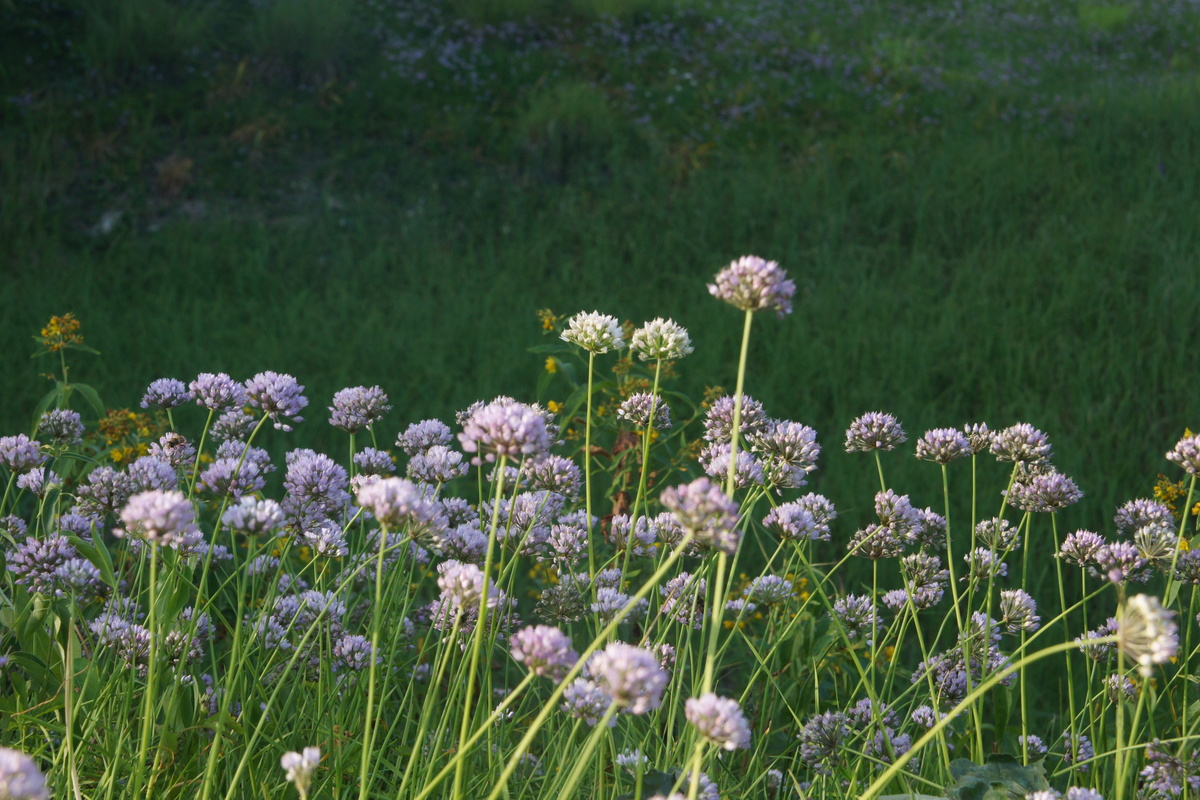 Dišeči luk na Radenskem polju.